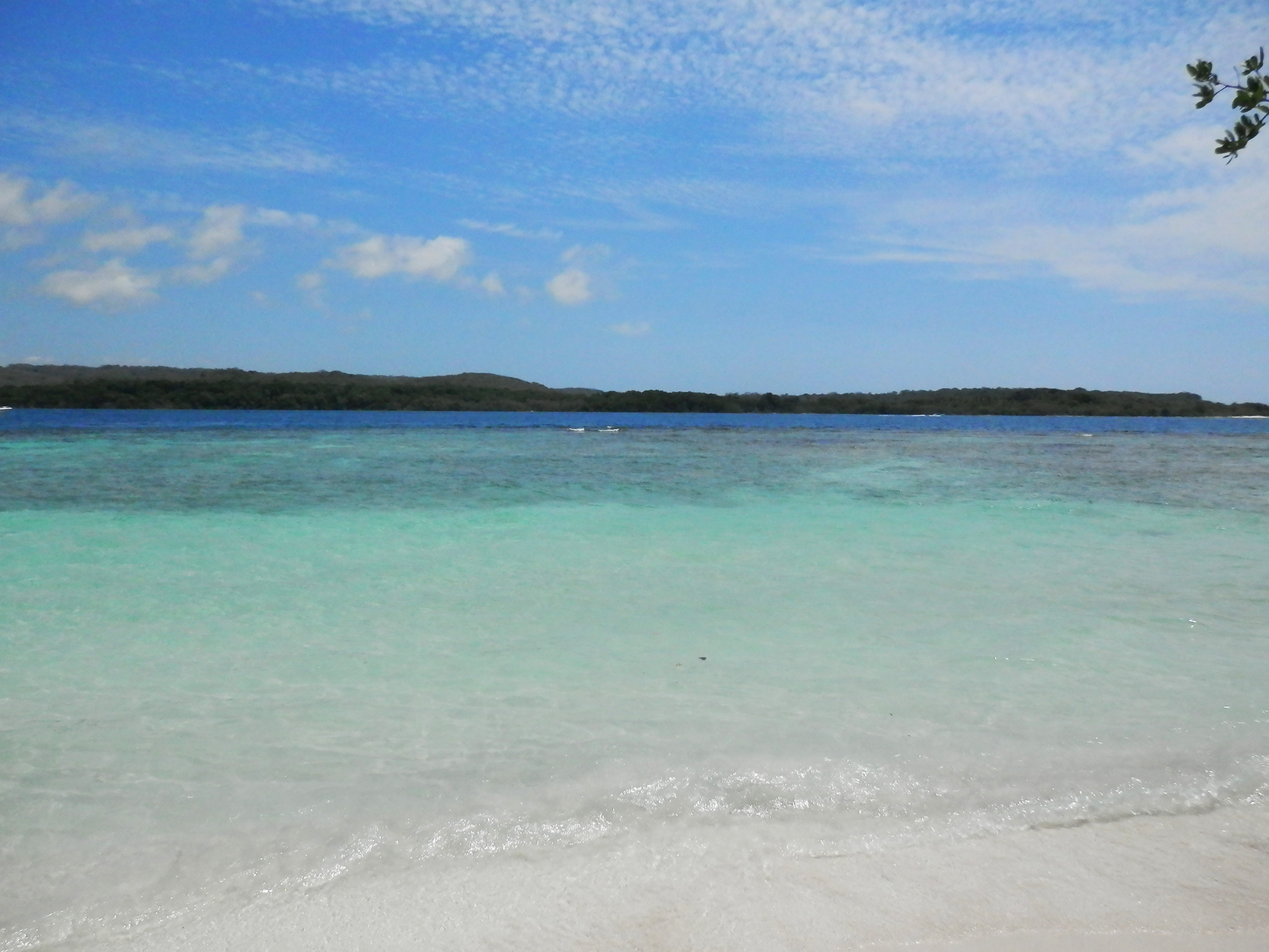 Parque Nacional Morrocoy